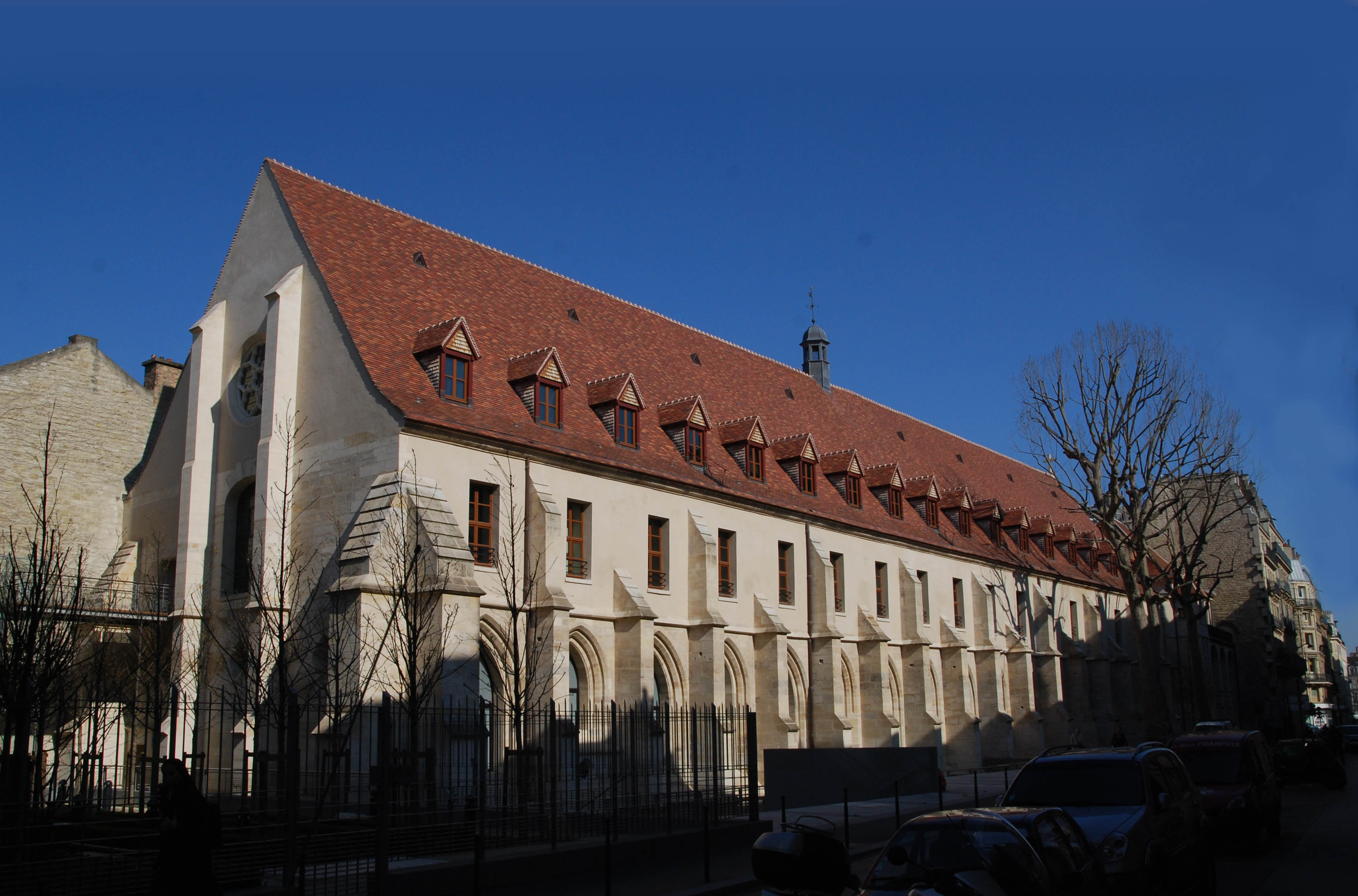 Collège des Bernardins, vue extérieure, Paris